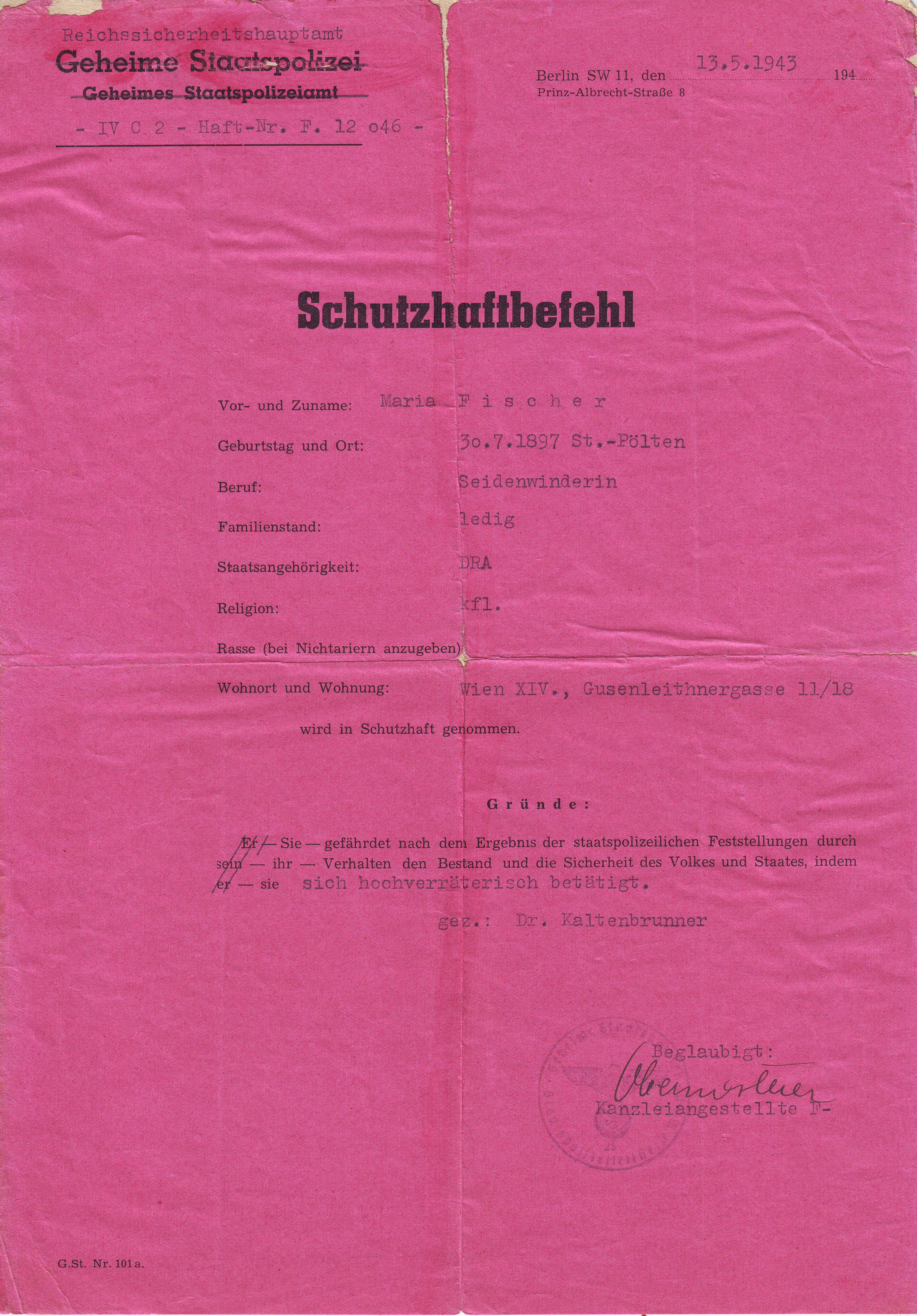 Schutzhaftbefehl Maria Fischer; eigener Scan; Original im Besitz des Autors